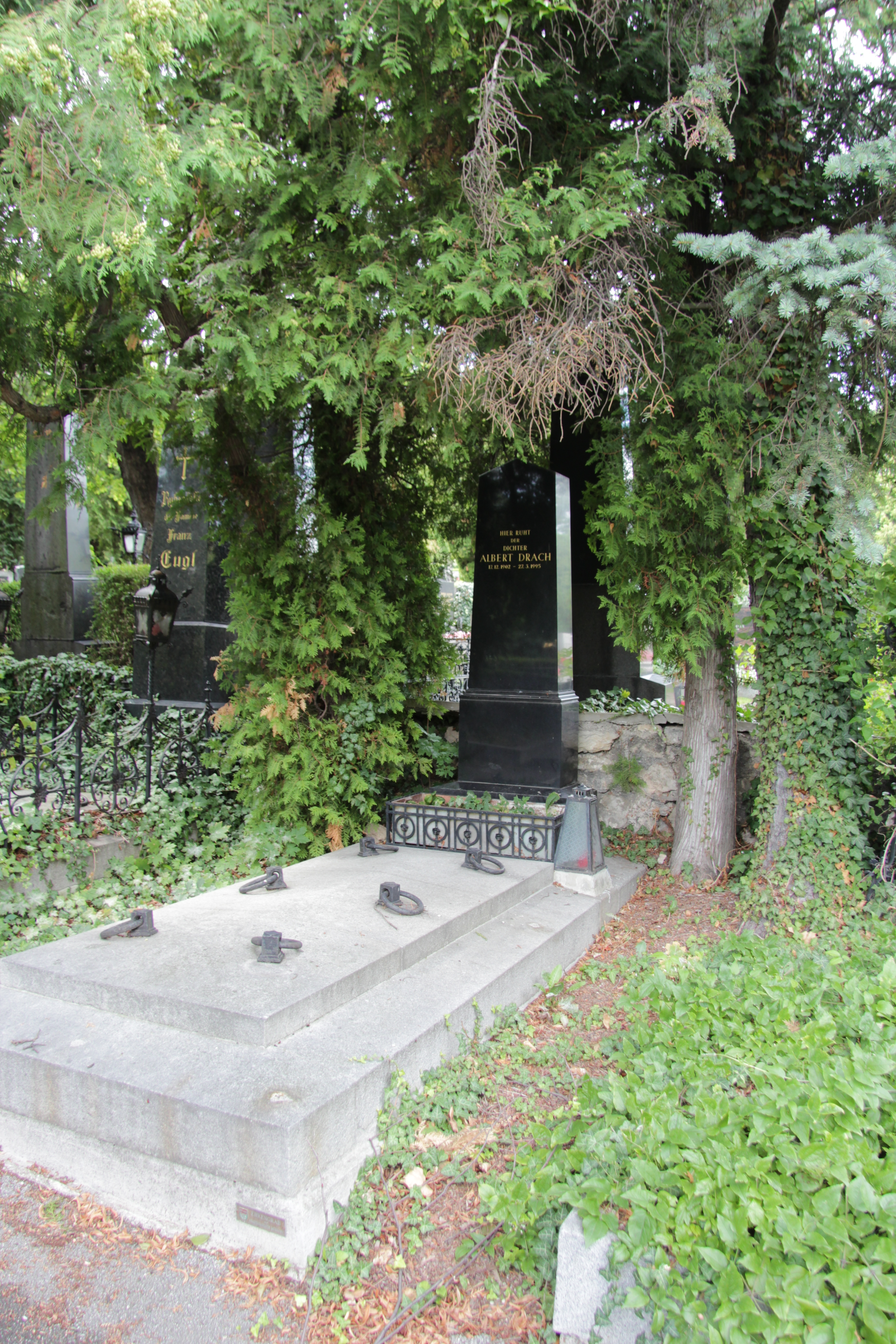 Grab von Albert Drach auf dem Friedhof in Mödling, Niederösterreich